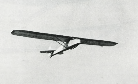 Szybowiec B-1 w locie. Oblot prototypu.